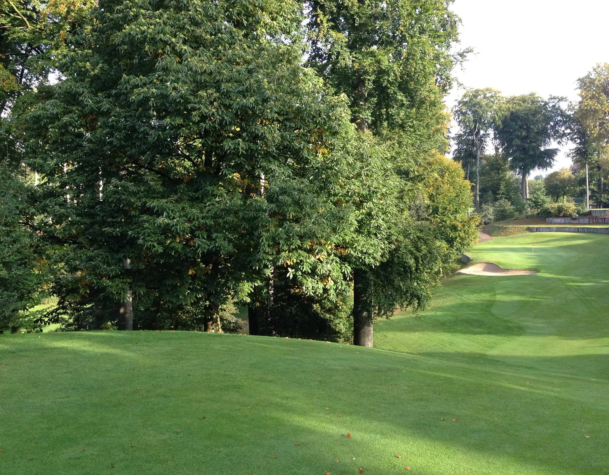 Trou n°9